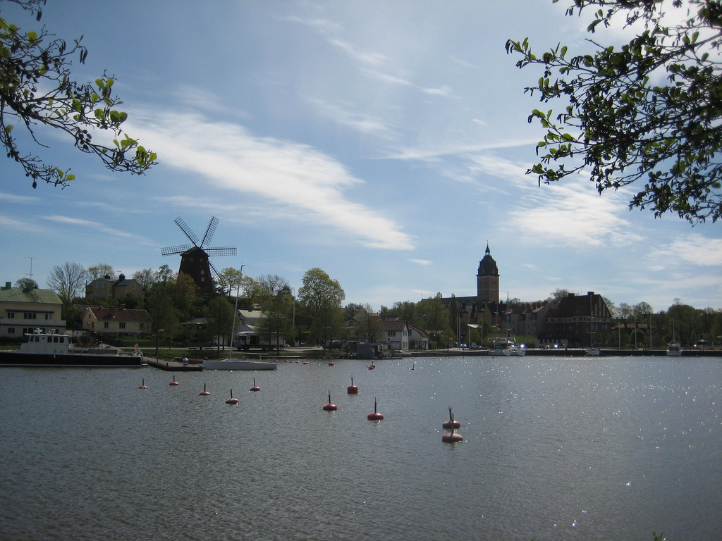 Vy över Strängnäs med väderkvarnen och domkyrkan.